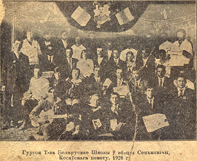 Гурток Таварыства Беларускай Школы ў вёсцы Сенькавічы Косаўскага павета. 1928 г.